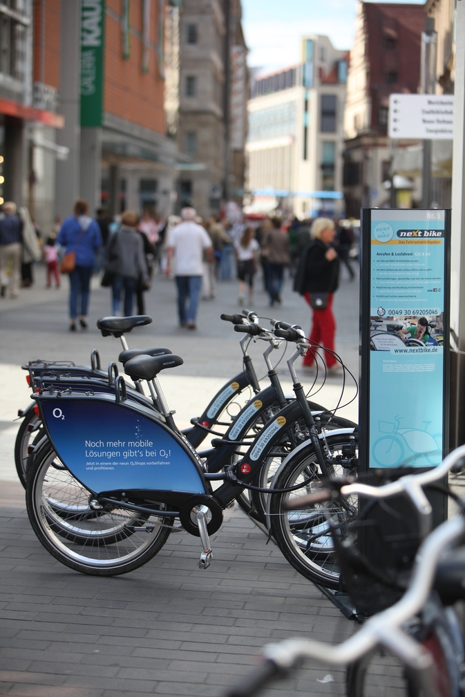 Nextbike bikes in Leipzig / Germany